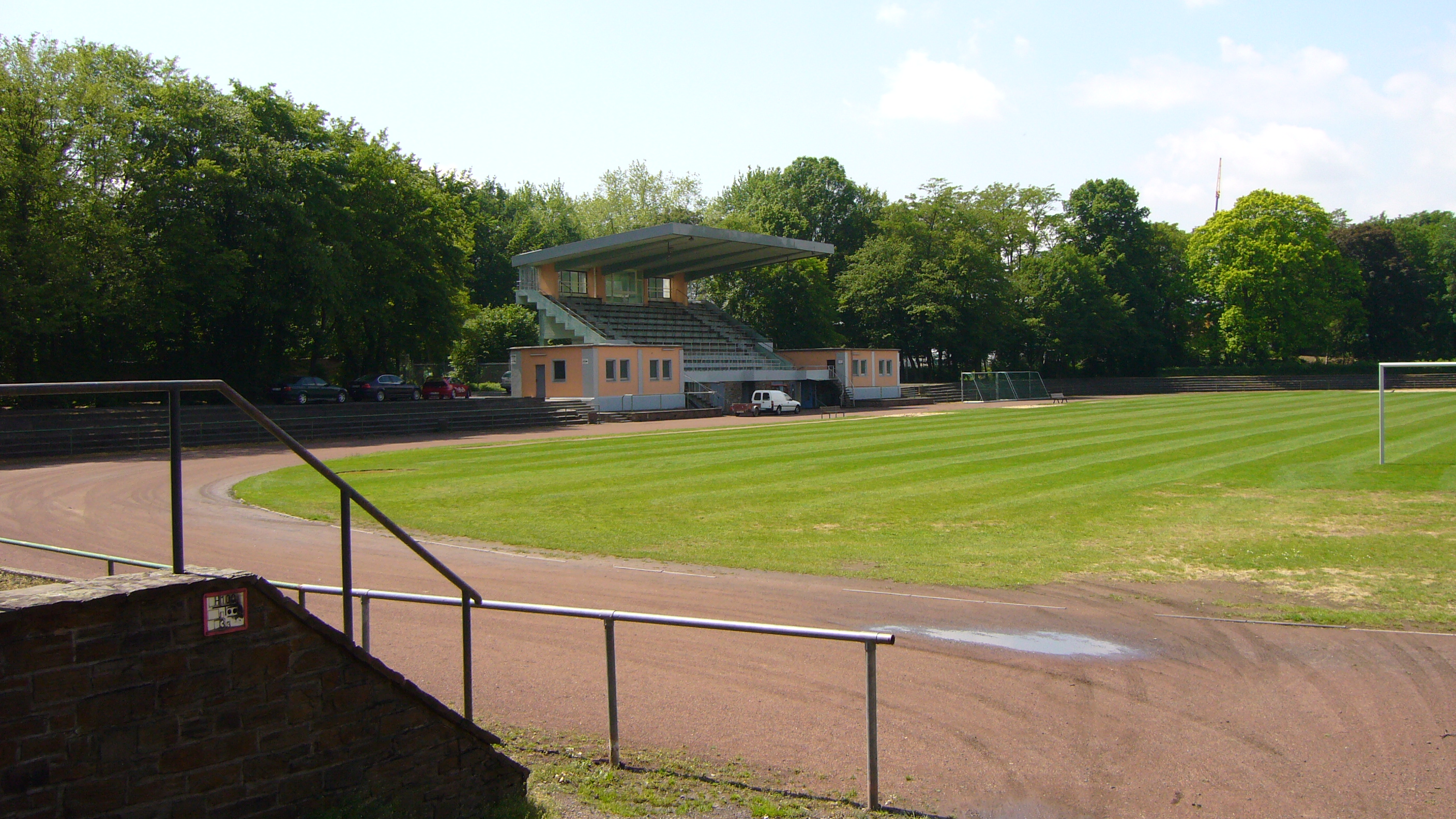 Stadion Neuwied